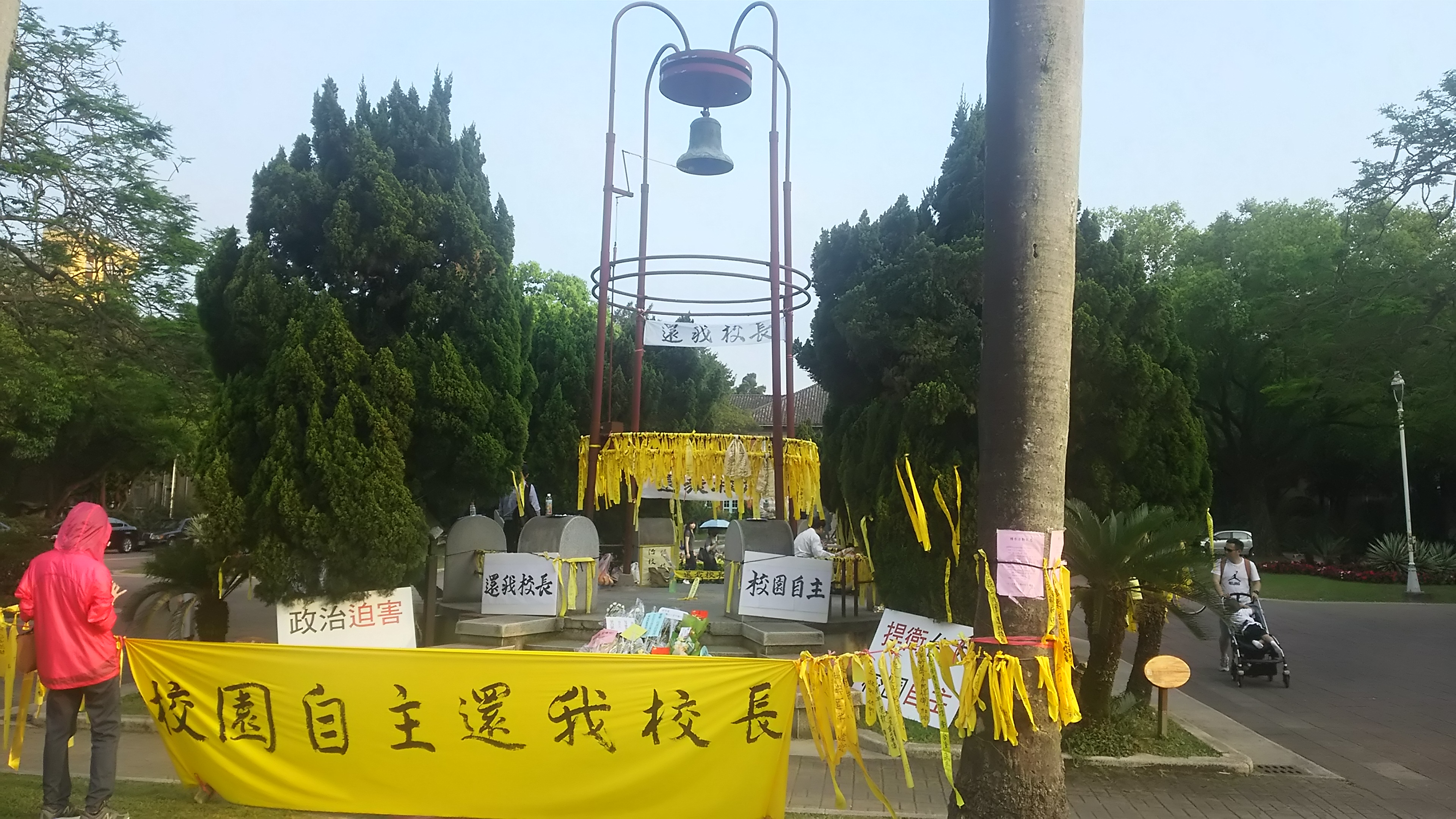 2018年國立臺灣大學校長遴選事件中，反對教育部干預大學自治方在教育部駁回聘任案後，在傅鐘所進行的黃絲帶聲援活動。